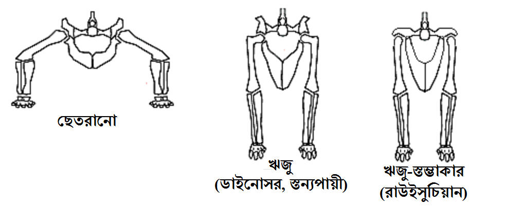 বাঁ দিক থেকে ডান দিকে সাধারণ সরীসৃপ, ডাইনোসর ও স্তন্যপায়ী, এবং রাউইসুচিয়া নামক কুমিরদের এক অবলুপ্ত জ্ঞাতির শ্রোণীচক্রের সাথে উরুর হাড়ের সংযোগস্থলের তুলনামূলক চিত্র। লক্ষ্য করুন ডাইনোসরেরা স্তন্যপায়ীদের মতো খাড়া হয়ে দাঁড়াতে পারত।